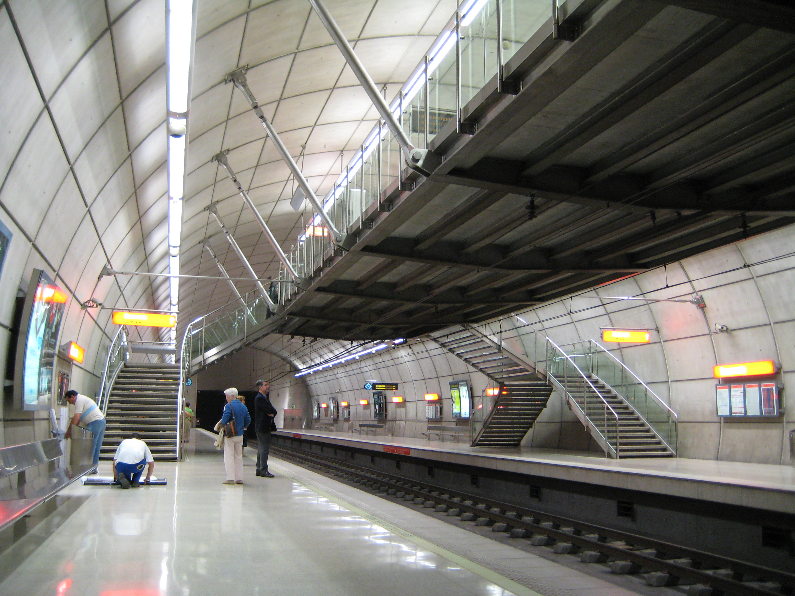 Basarrateko metro geltokia, Bilbo.